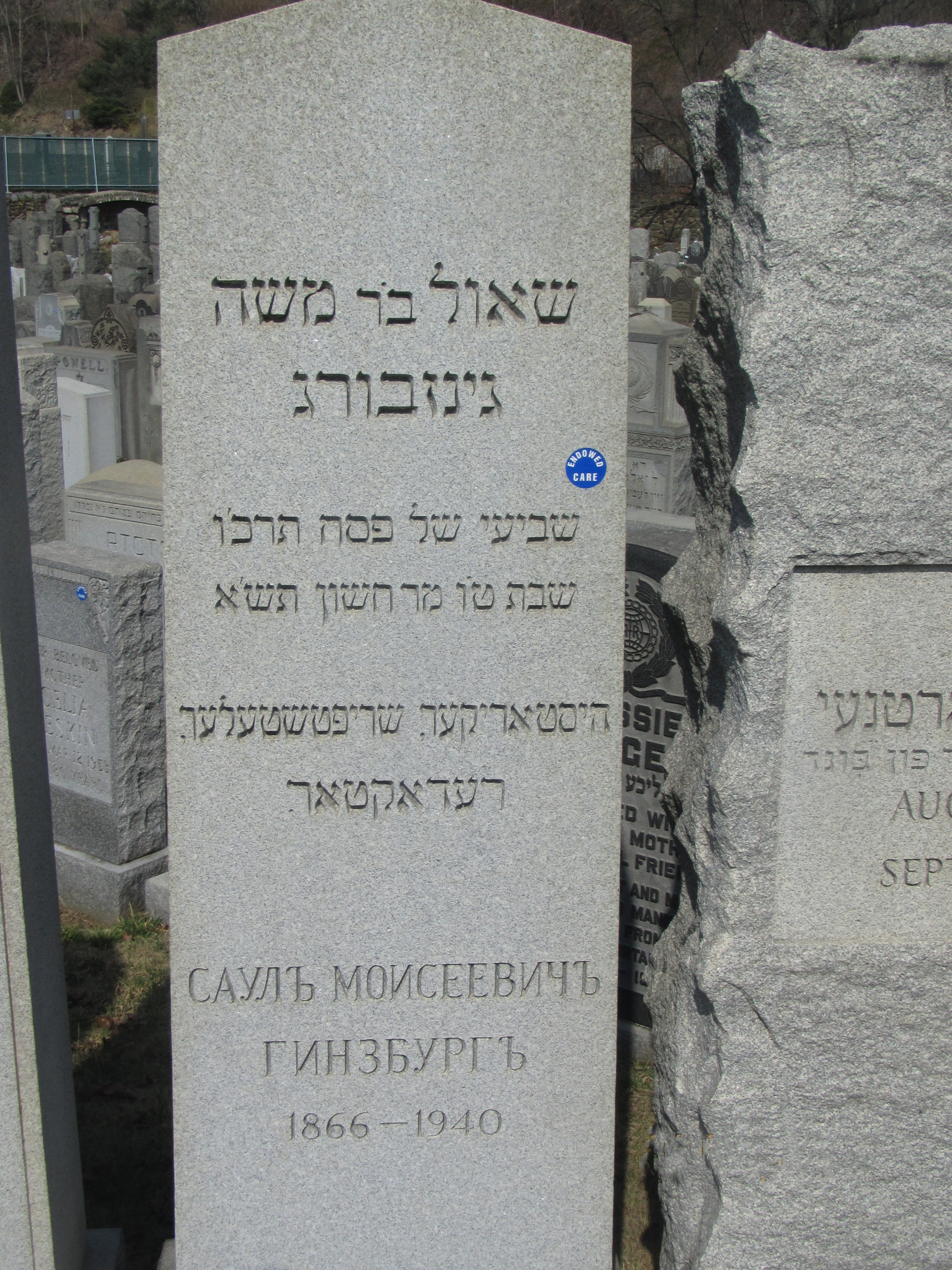 מצבתו של שאול גינזבורג בבית קברות בניו יורק